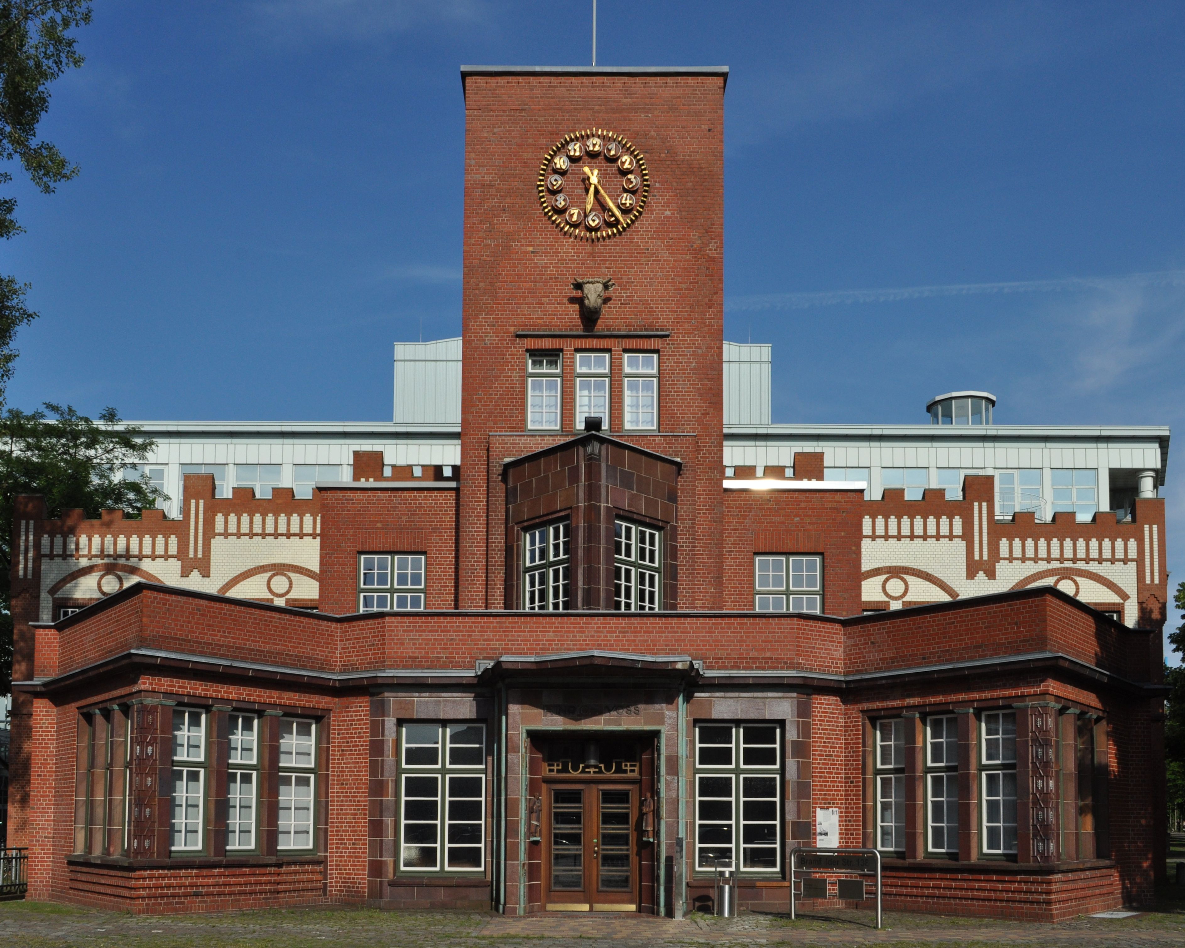 Kopfbau der ehemaligen Margarinefabrik Voss an der Bramfelder Straße 138 in Hamburg-Barmbek-Nord This is a photograph of an architectural monument.